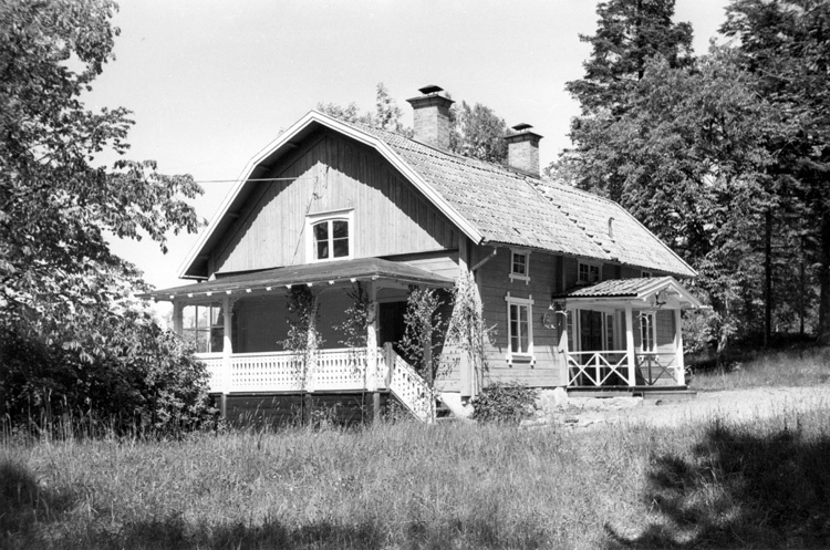 Lugnhamns gård, Stäket. Huvudbyggnaden från landsidan, juni 1968.